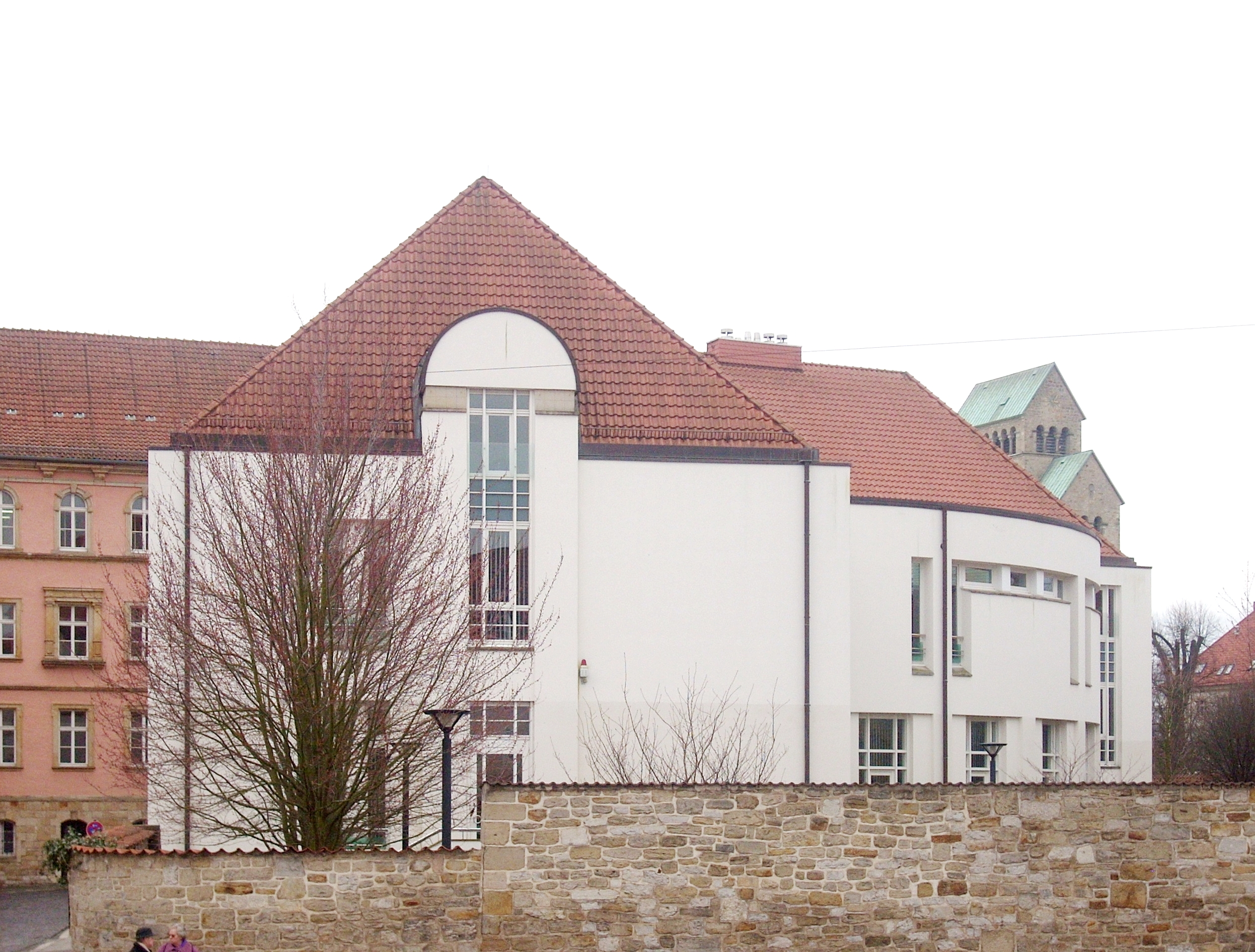 Hildesheim, Dombibliothek